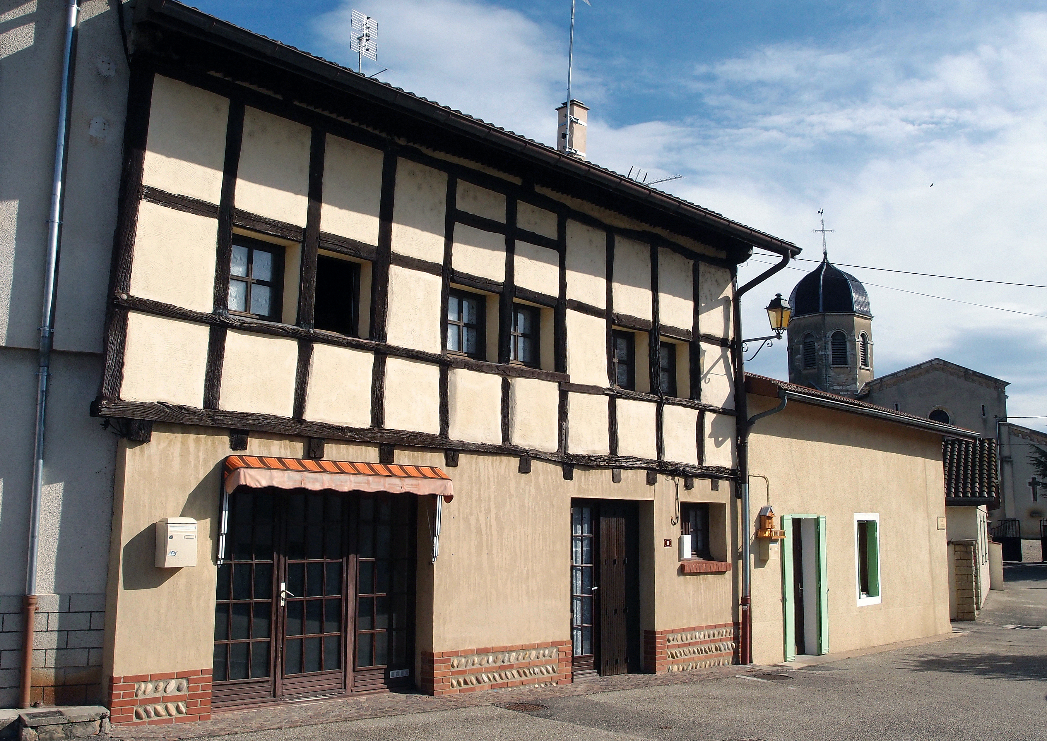 Maison à pans de bois, C.G.C. 22 vers Meximieux (Inscrit, 1937) .